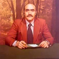 Ciro Papa in arte Xiro Papas